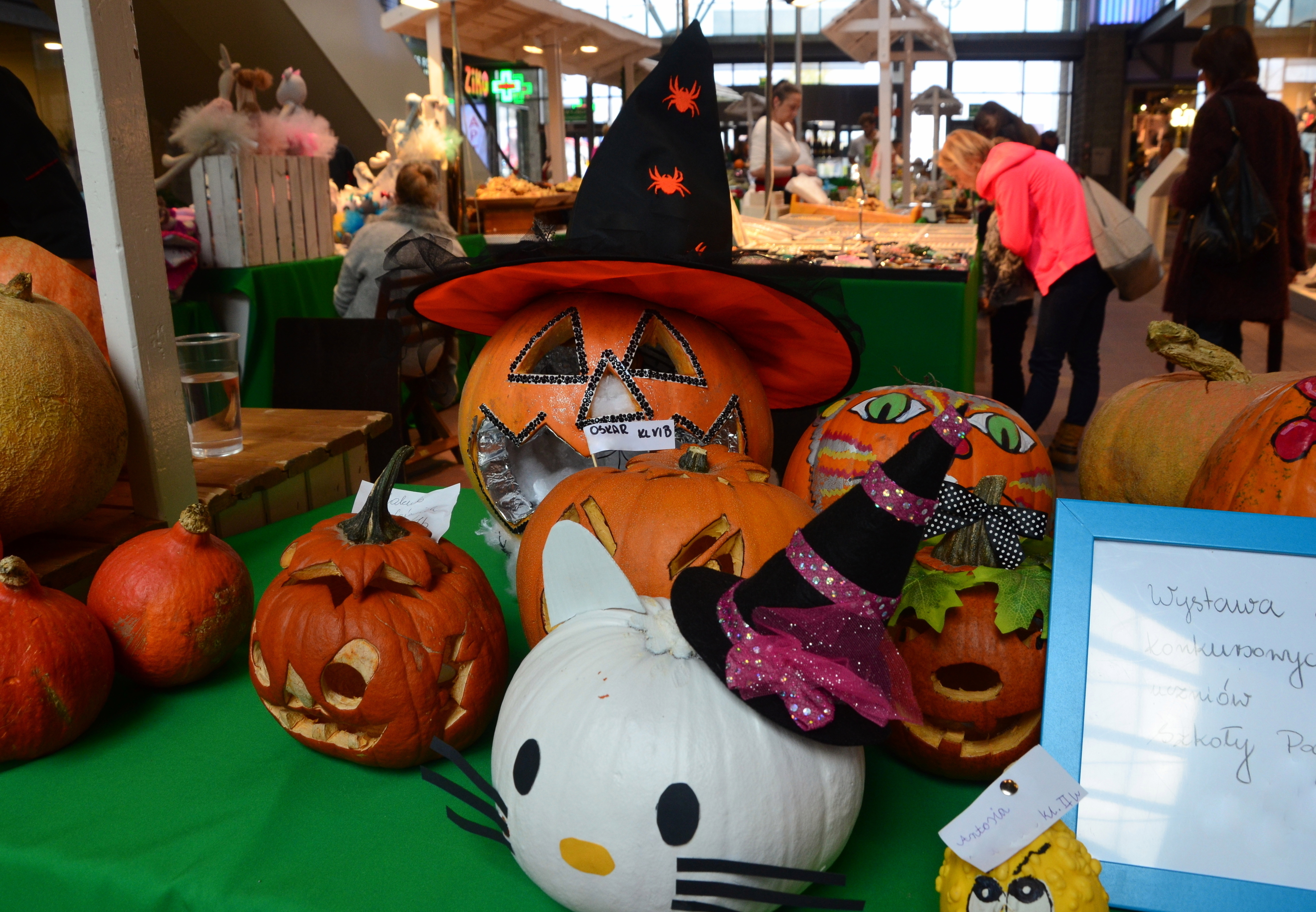 Halloween-Fest 2016, Beskiden